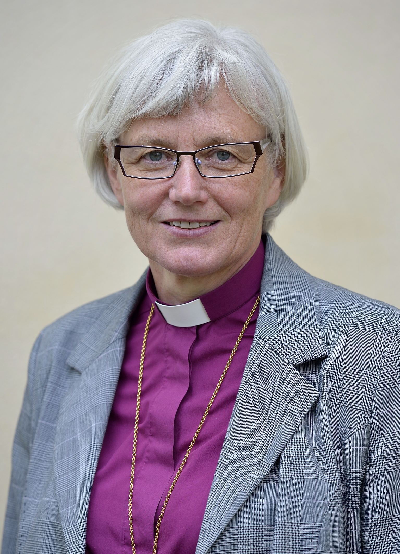 Biskop Antje Jackelén, Lunds stift (2013).